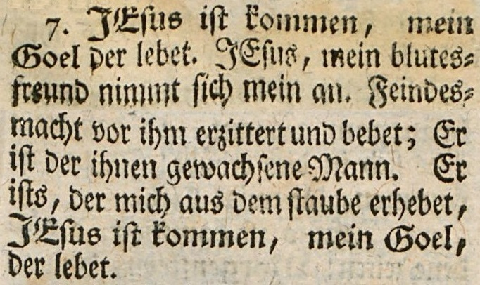 Jesus ist kommen, Druckfassung 1769, Strophe 7. Das hebräische Wort Goel bedeutet Auslöser, Rechtverschaffer. Die Strophe spielt auf Ijob 19:25 an.